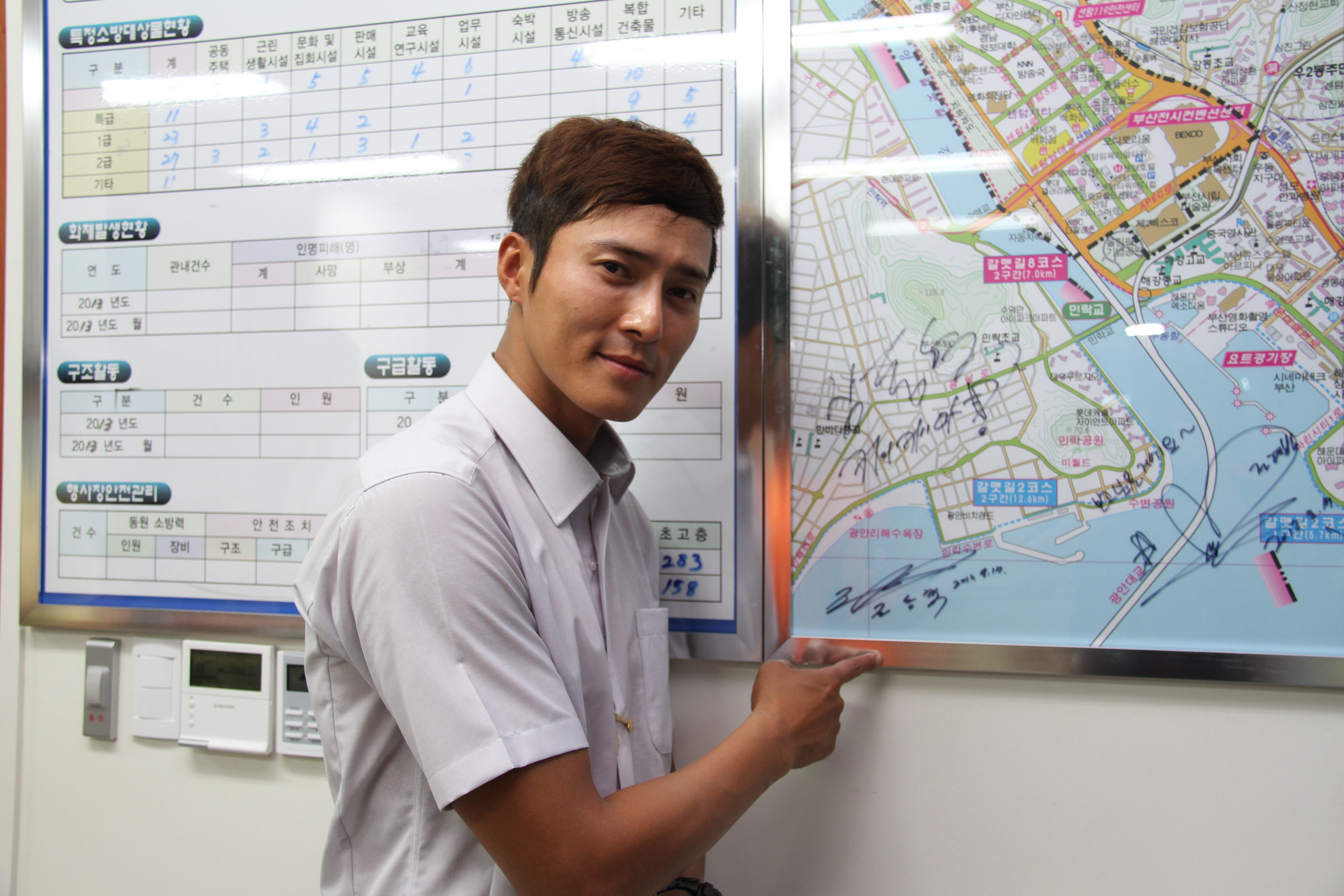 서울특별시 소방재난본부 소장 사진. Photos of Seoul Metropolitan Fire and Disaster Headquarters. Declaration of consent(sent to ). 이 파일은 크리에이티브 커먼즈 저작자표시-동일조건변경허락 4.0 국제 라이선스로 배포됩니다. 단 누구인지 구별 가능한 특정 인물이 사진에 포함되어 있을 경우 사용 전에 서울특별시 소방재난본부 및 해당 인물의 승인을 받으셔야합니다. 감사합니다.